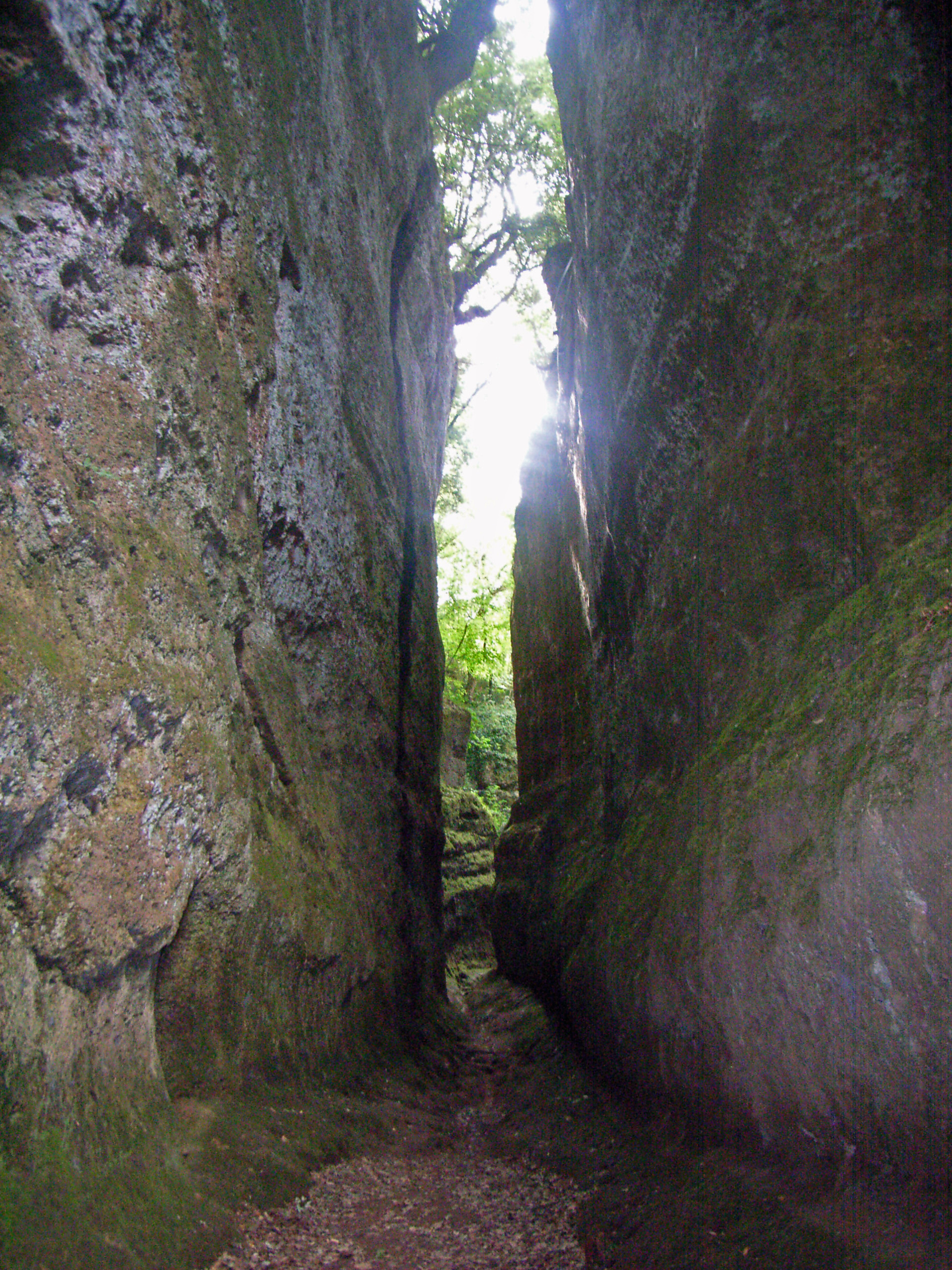 Via Cava nella Necropoli di Sovana, Tuscany, Italy.